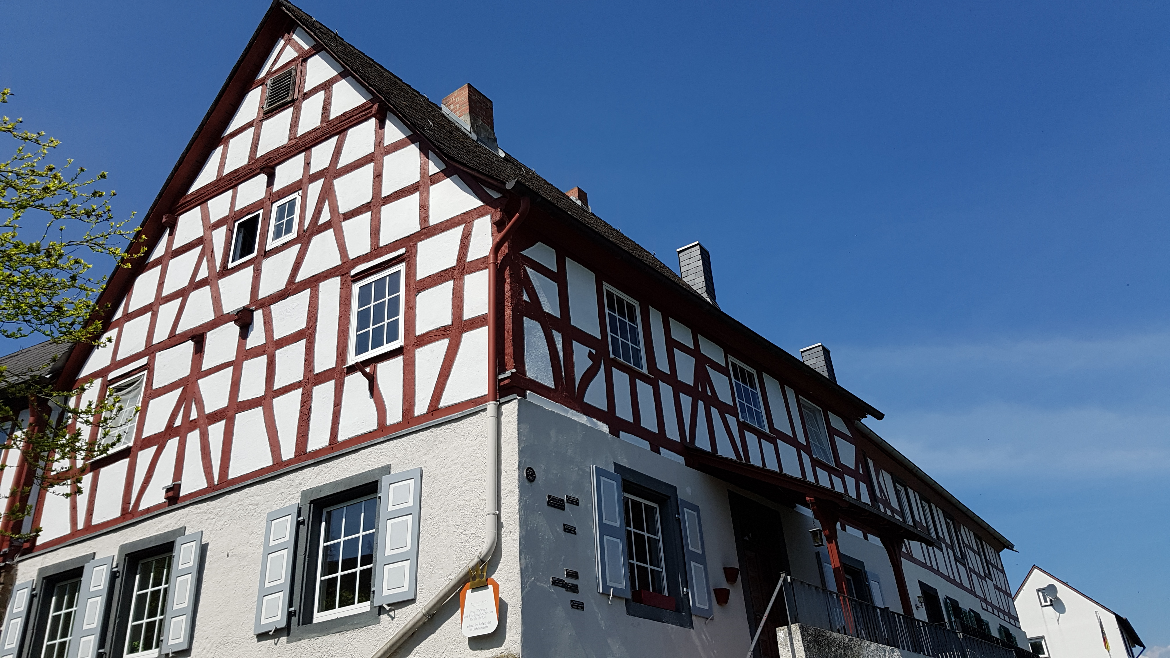 Kulturdenkmäler